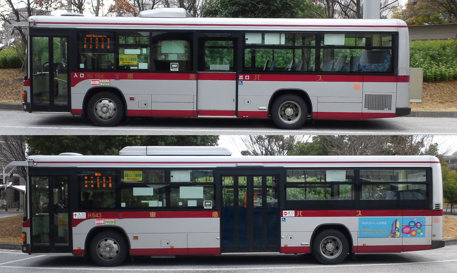 バスのホイールベースの違いの比較画像。上はホイールベース4.8m、下はホイールベース5.8m。センター南駅にて撮影